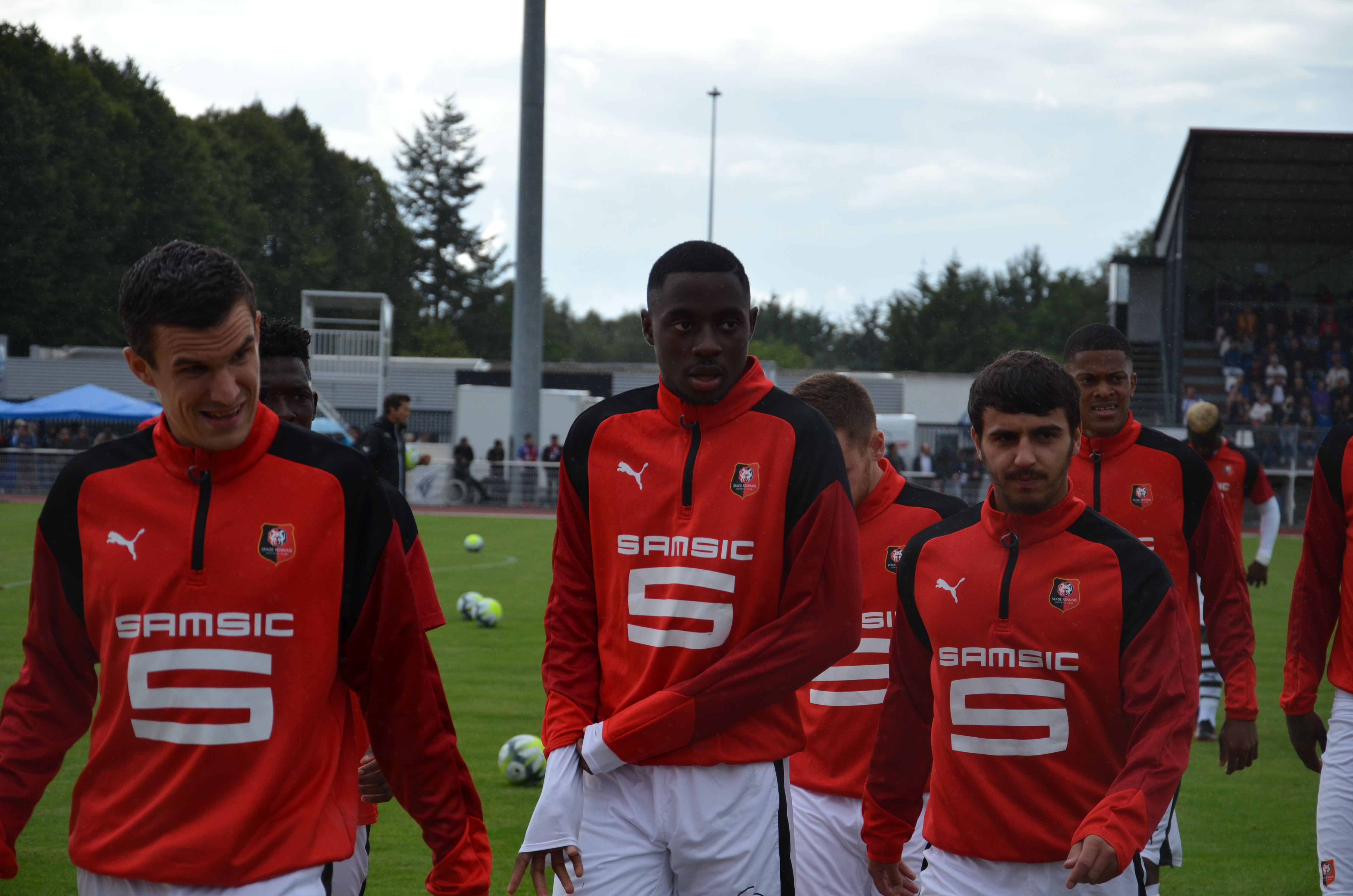 Photographie prise lors du match opposant le Stade rennais au SM Caen en match amical au stade Pierre-Compte de Vire le 22 juillet 2017. Ici, les joueurs rennais à l'issue de l'échauffement.